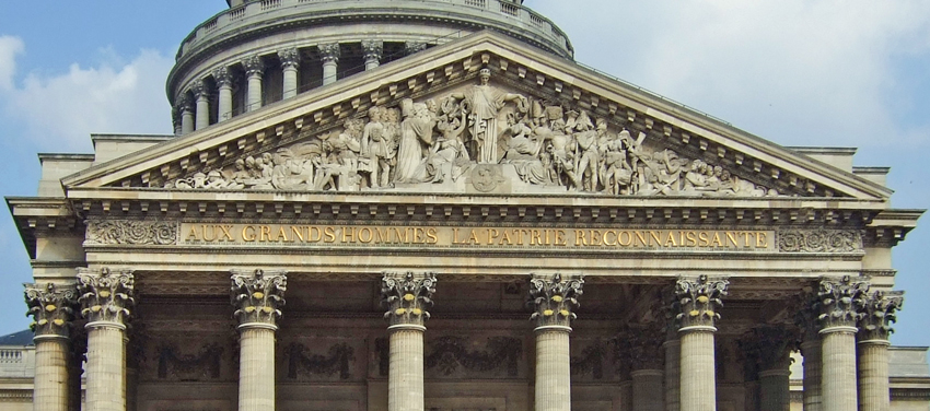 Fronton du Panthéon - Paris "Aux grands hommes la patrie reconnaissante"